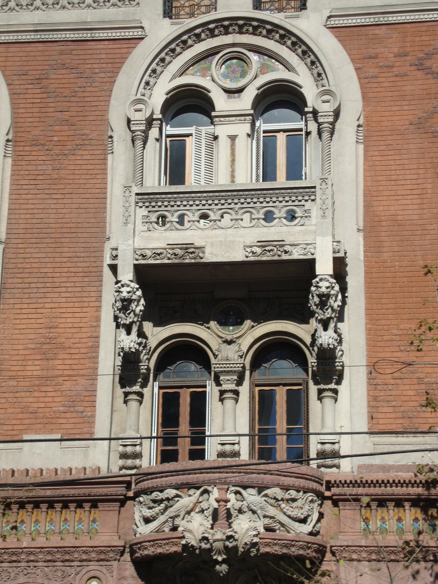 Balcones y ventanas de la "Casa de los Pavos Reales", edificio de viviendas y locales comerciales construido por el arquitecto milanés Virginio Colombo hacia 1912. Estilo: Ecléctico (Liberty milanés). Dirección: Av. Rivadavia 3216/22/36. Uso: El Edificio de los Pavos Reales Bed & Breakfast. Buenos Aires, Argentina.